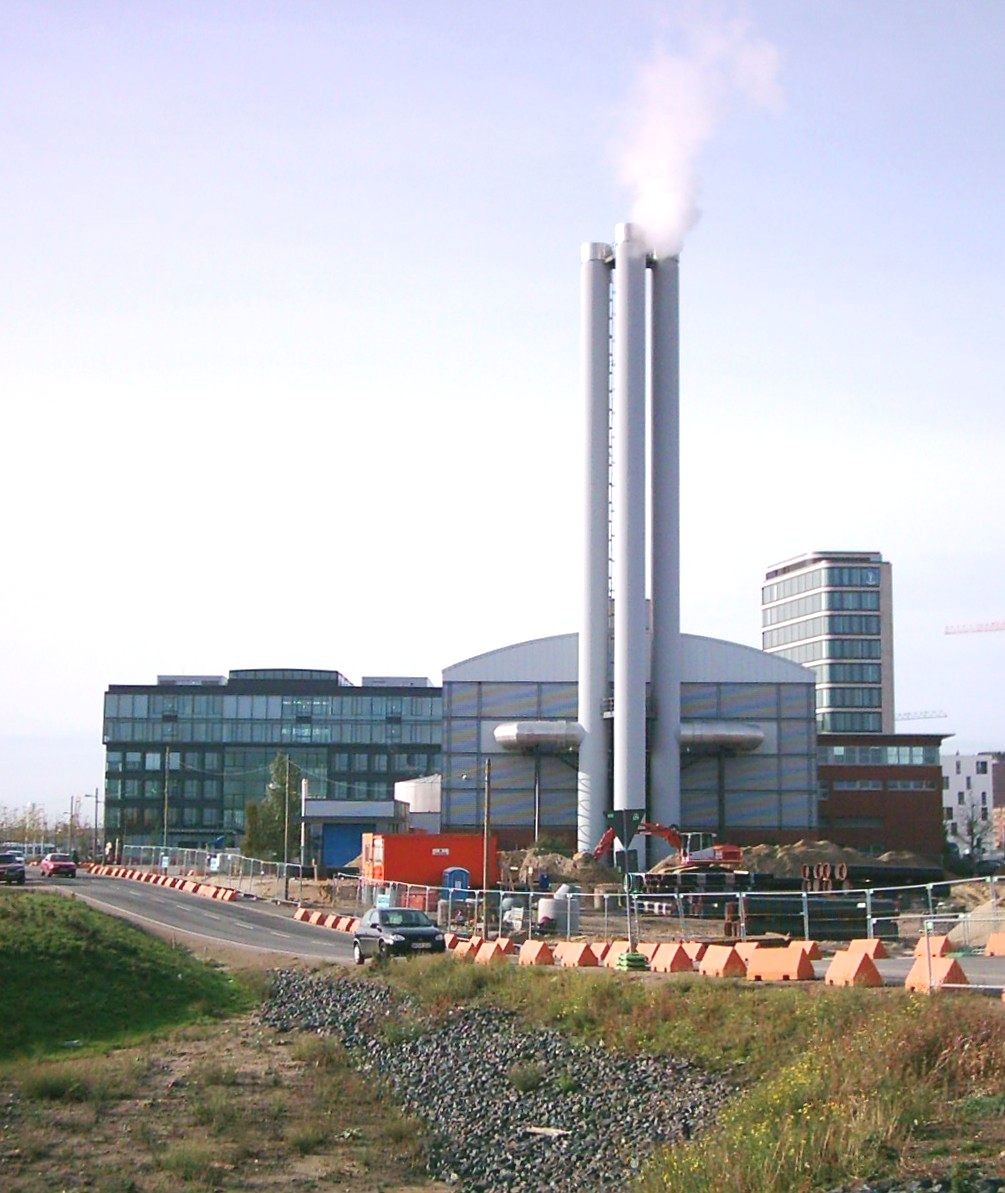 Vattenfall Brennstoffzellen-Heizwerk (245kW) in der HafenCity, Am Grasbrookhafen.